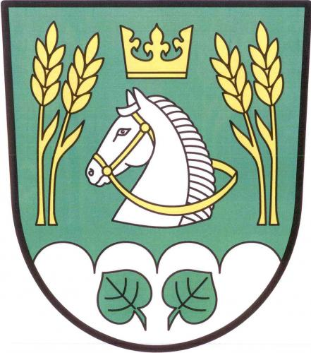 Bošice znak